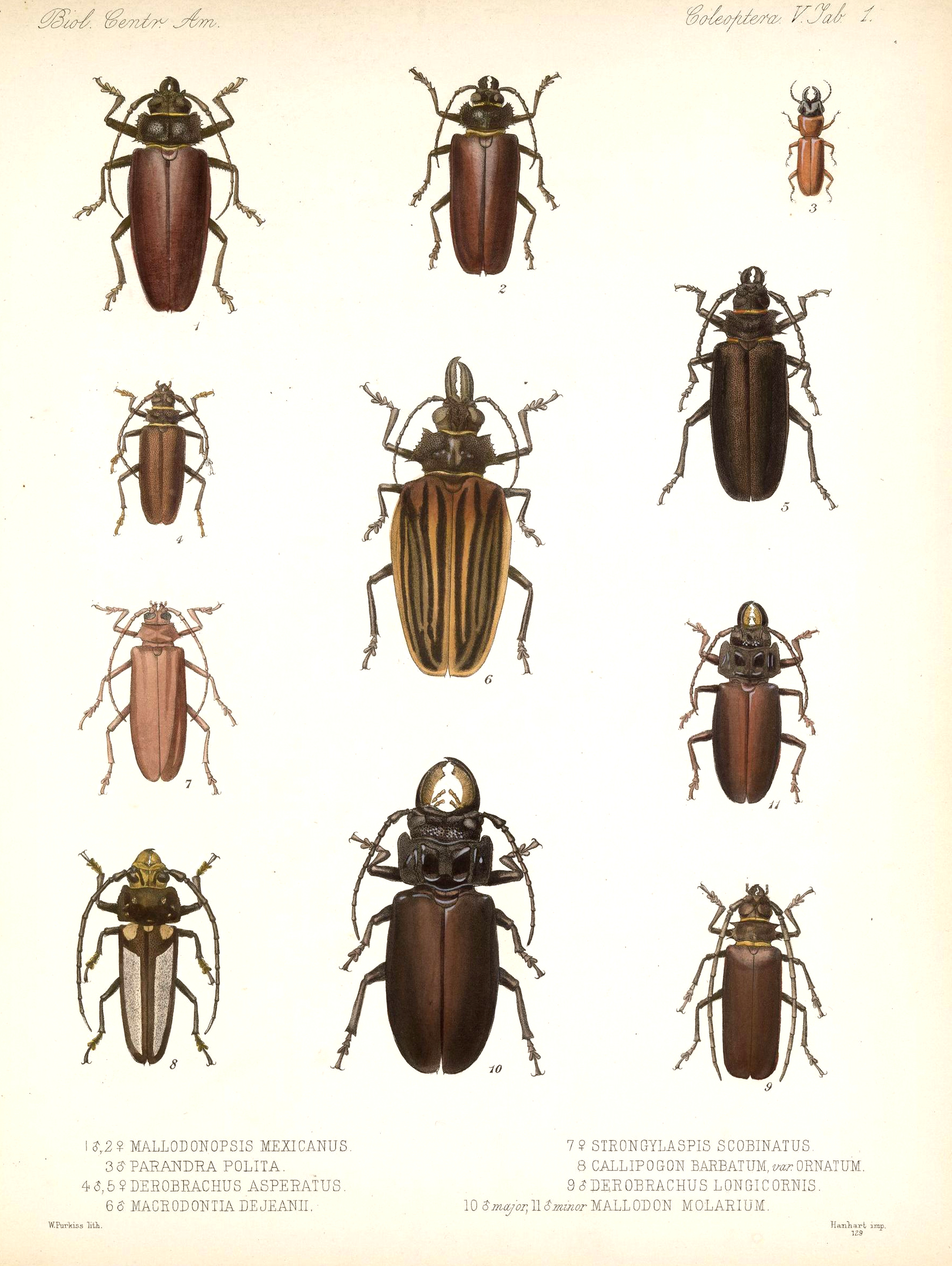 See image for index to numbers. Mallodonopsis mexicanus Thomson, 1861 = Mallodonopsis mexicanus Thomson, 1861 (♂) Mallodonopsis mexicanus Thomson, 1861 = Mallodonopsis mexicanus Thomson, 1861 (♀) Parandra polita Say, 1835 = Parandra (Tavandra) polita Say, 1835 (♂) Derobrachus asperatus Bates, 1878 = Derobrachus asperatus Bates, 1878 (♂) Derobrachus asperatus Bates, 1878 = Derobrachus asperatus Bates, 1878 (♀) Macrodontia dejeani Bates, 1879 = Macrodontia batesi Lameere, 1912 (♂) Strongylaspis scobinatus Thomson, 1861 = Strongylaspis corticarius (Erichson, 1848) (♀) Callipogon barbatum var. ornatum Bates, 1879 = Callipogon (Callipogon) barbatum (Fabricius, 1781) Derobrachus longicornis Bates, 1879 = Derobrachus longicornis (Bates, 1872) (♂) Mallodon molarium Bates, 1879 = Mallodon chevrolatii chevrolatii Thomson, 1867 (♂) major Mallodon molarium Bates, 1879 = Mallodon chevrolatii chevrolatii Thomson, 1867 (♂) minor